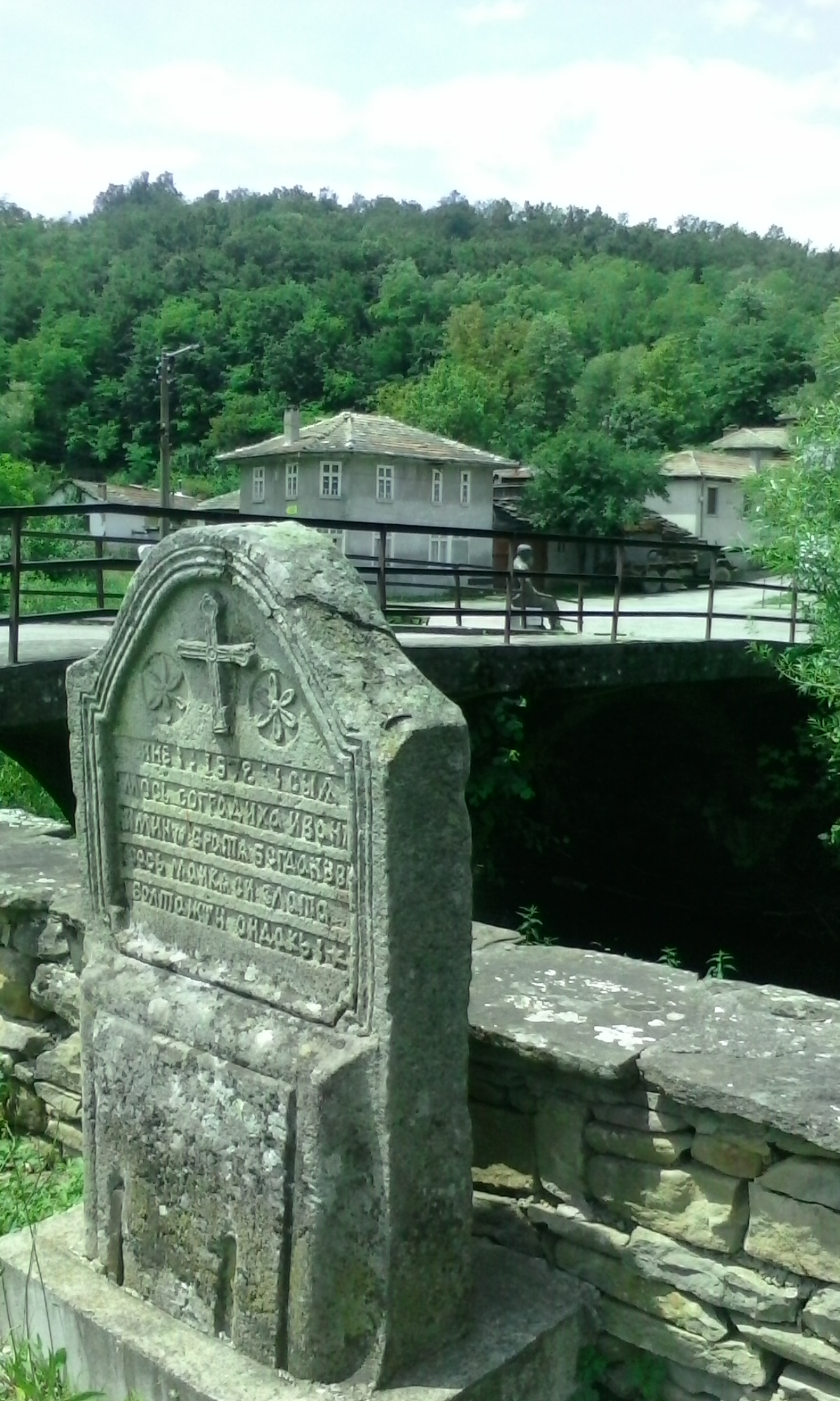 Строителен надпис от 1872 на Минчо Богданов, брат му Иван и майка им Злата за моста в с. Кметьовци до Боженци